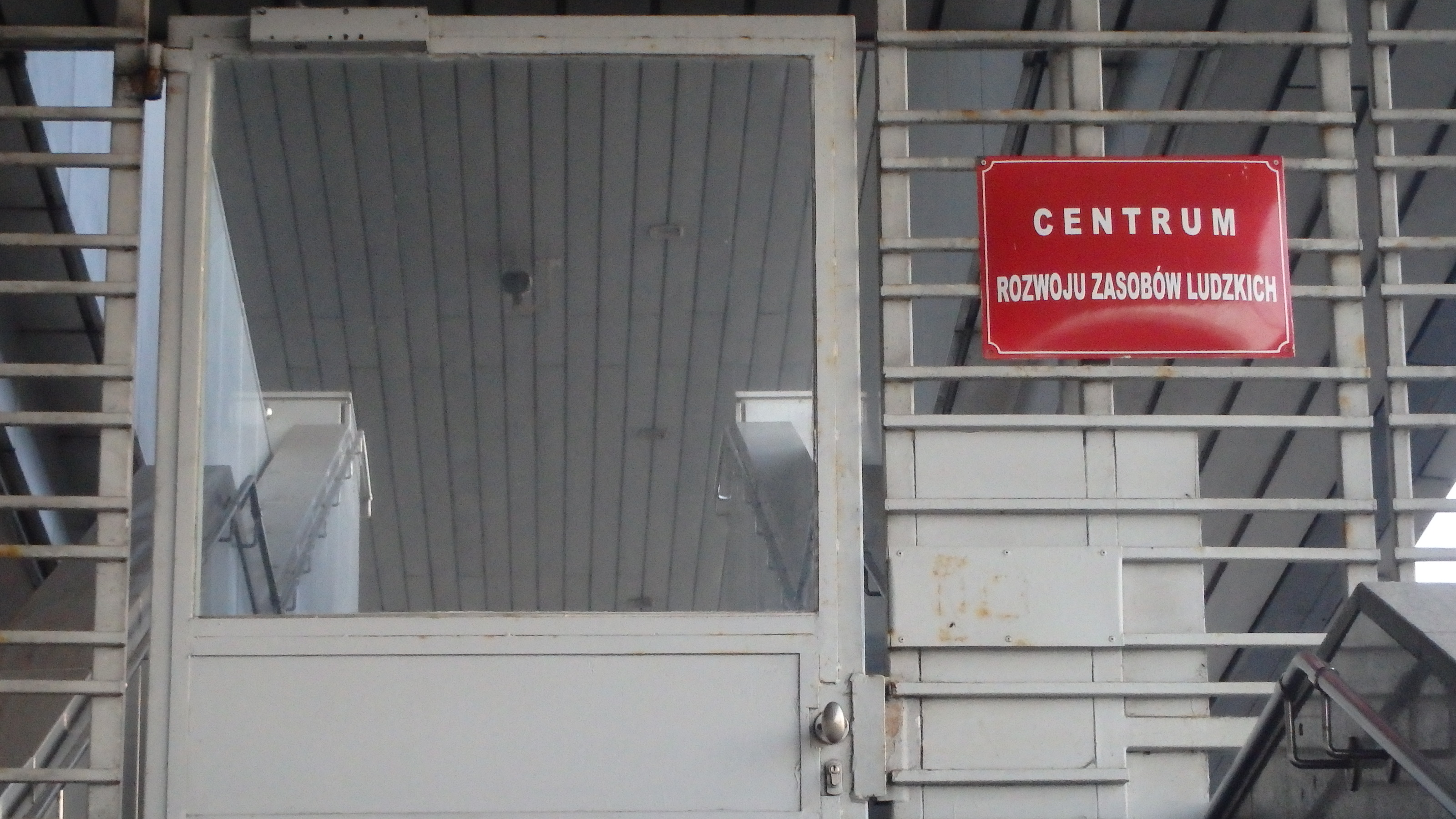 Centrum Rozwoju Zasobów Ludzkich w Warszawie